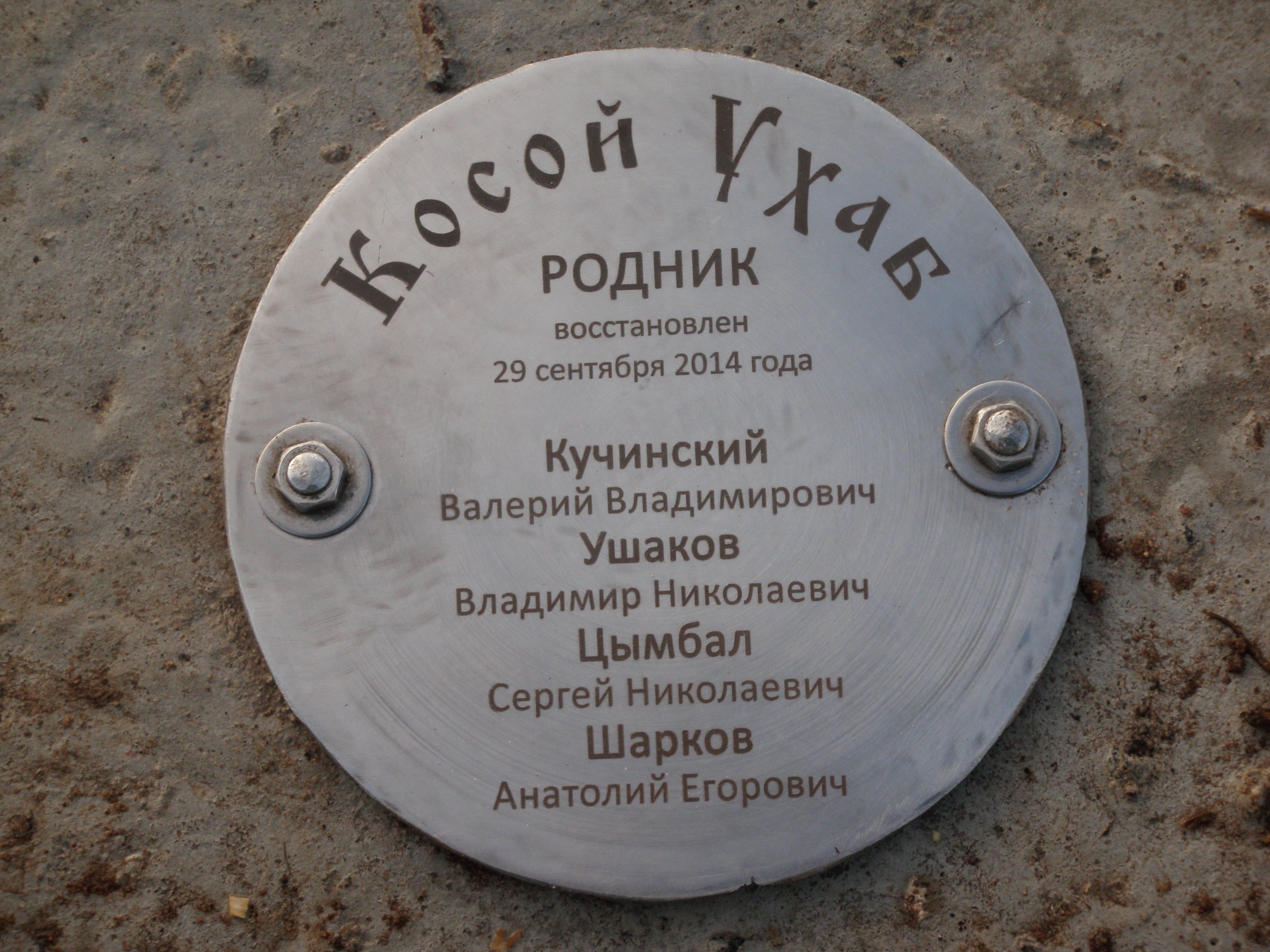 Памятная табличка установлена 29 сентября 2016 г у Святого Источника Иоакима и Анны